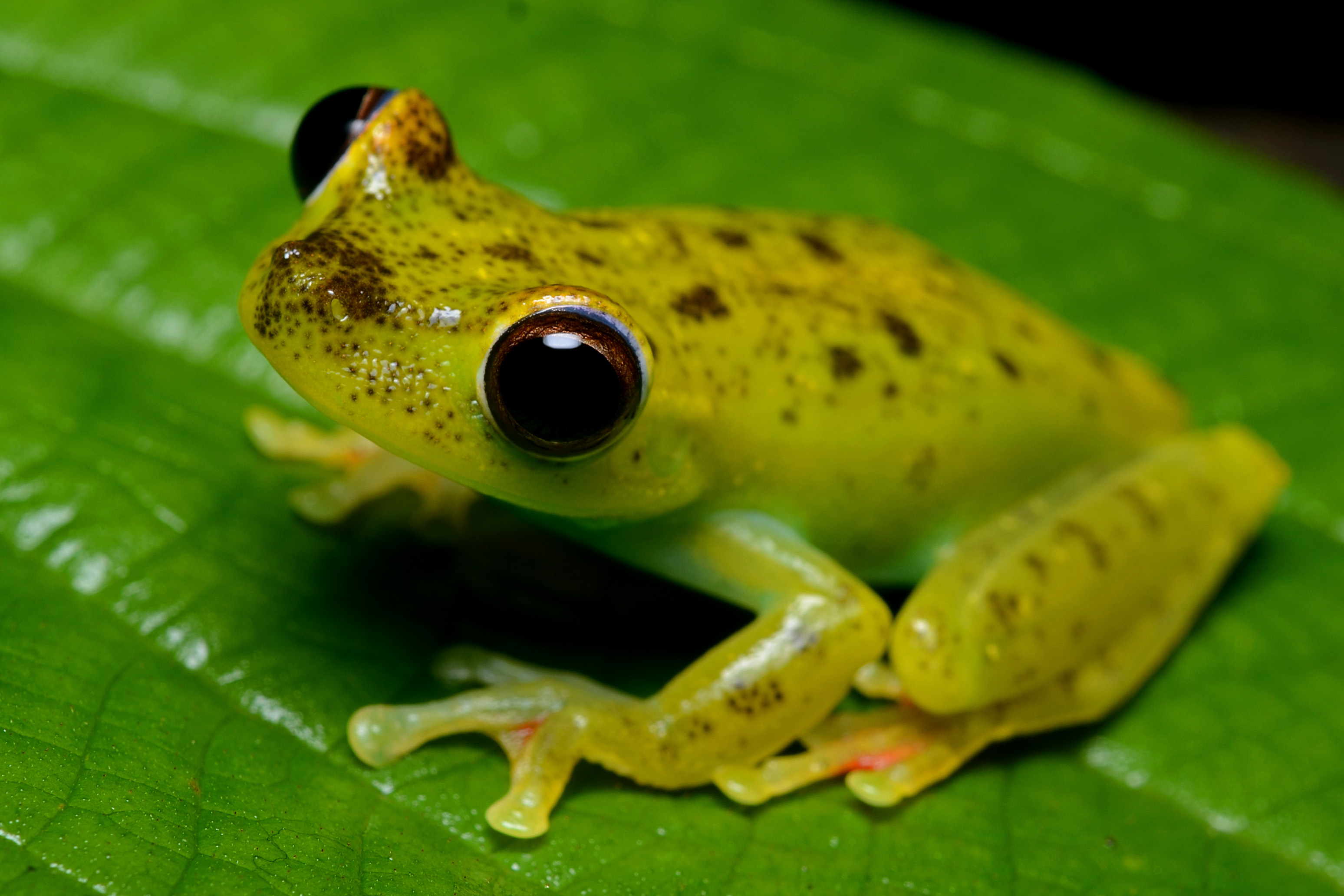 Hylidae: Hypsiboas rufitelus